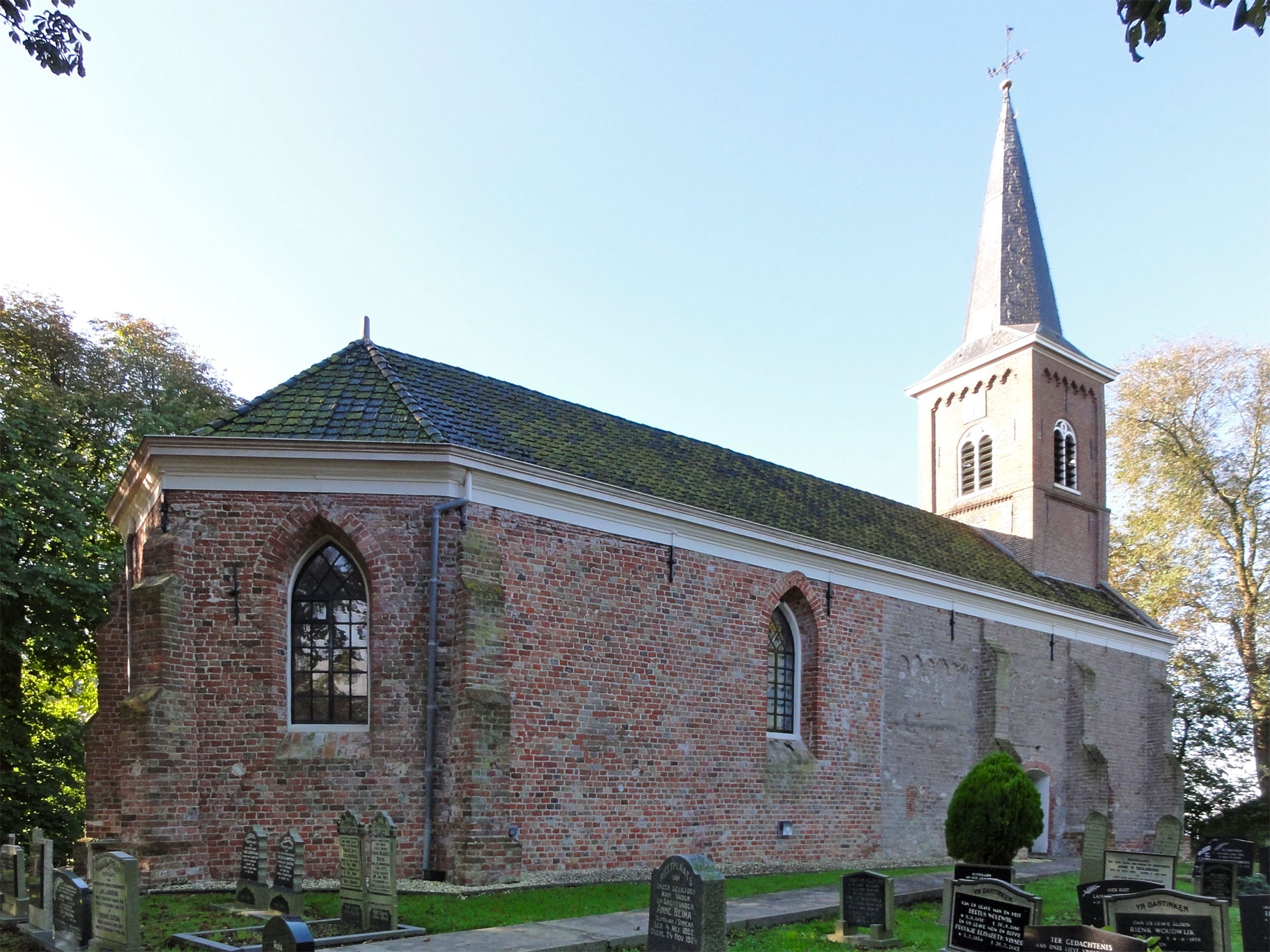 Kerk van Brantgum, rijksmonument